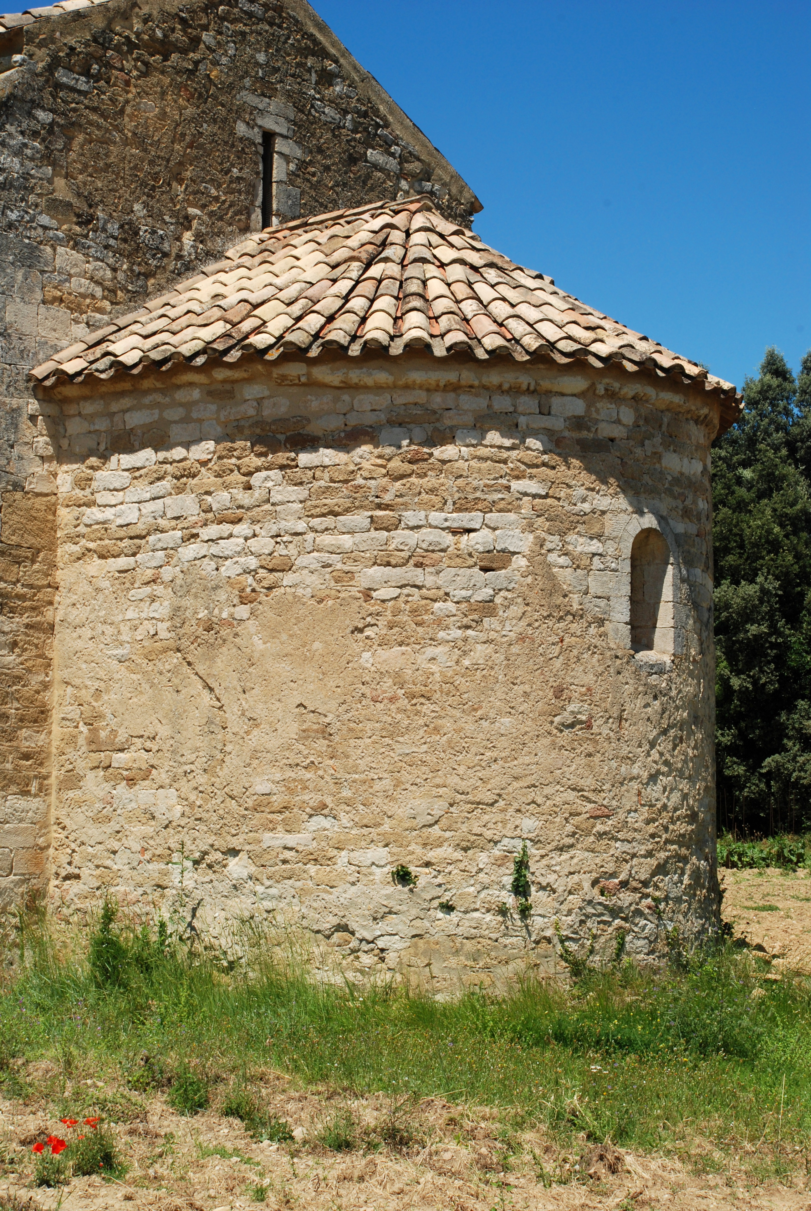 France - Drôme - Église Saint-Pierre-ès-Liens de Colonzelle